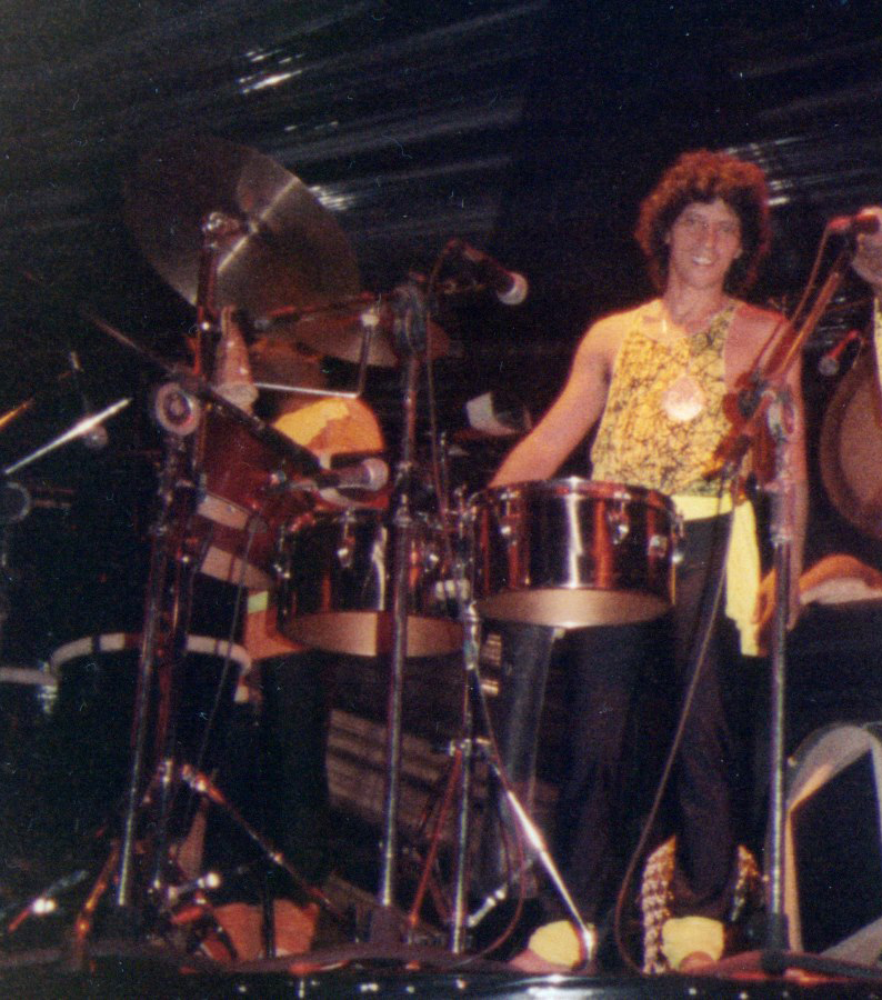 Baxinho - 1984 - Pepeu e Baby